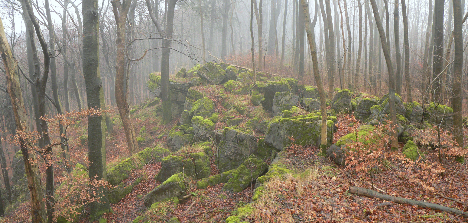 Ith